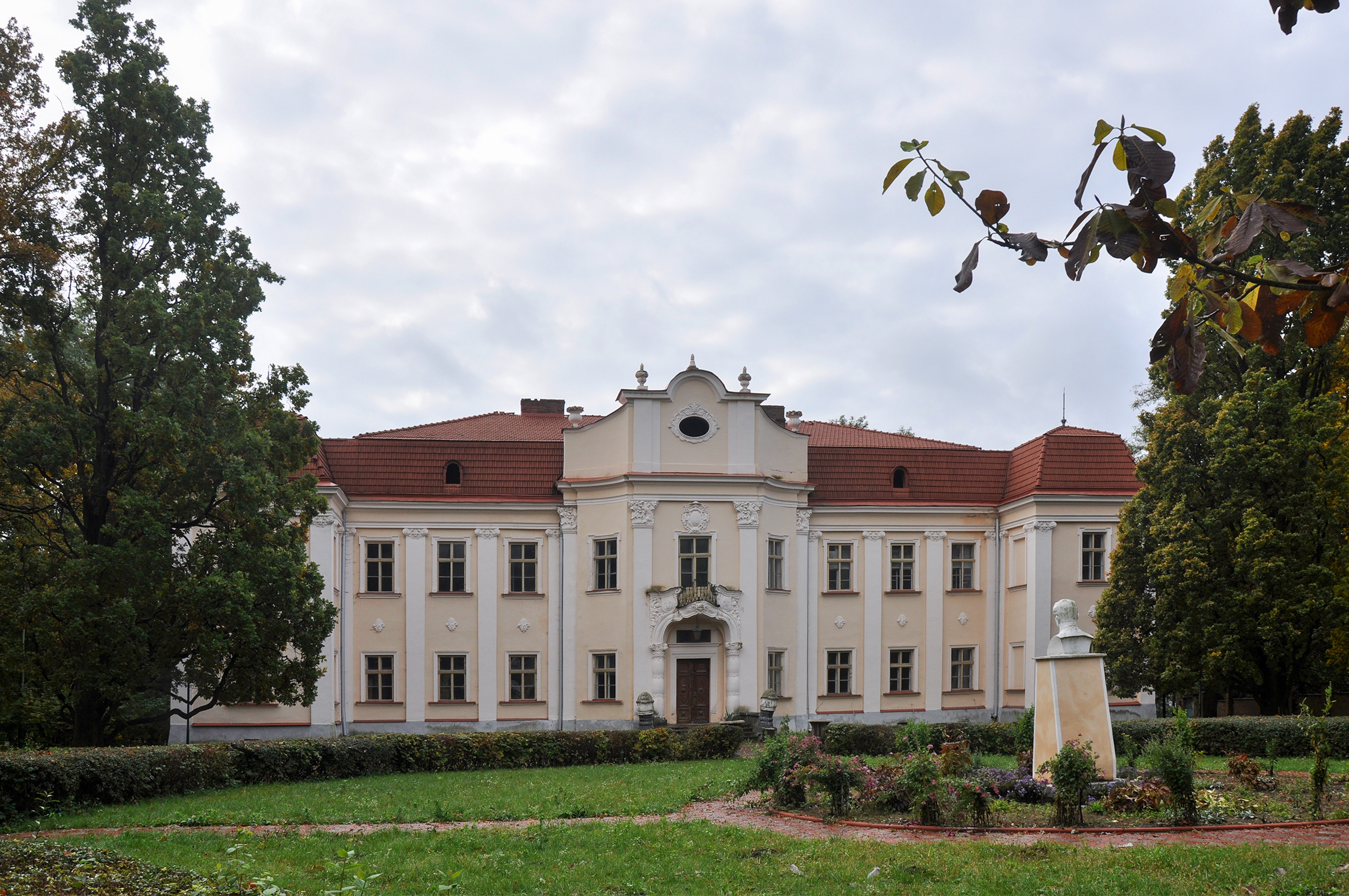 Садиба львівських архієпископів (мур.), с.Оброшине